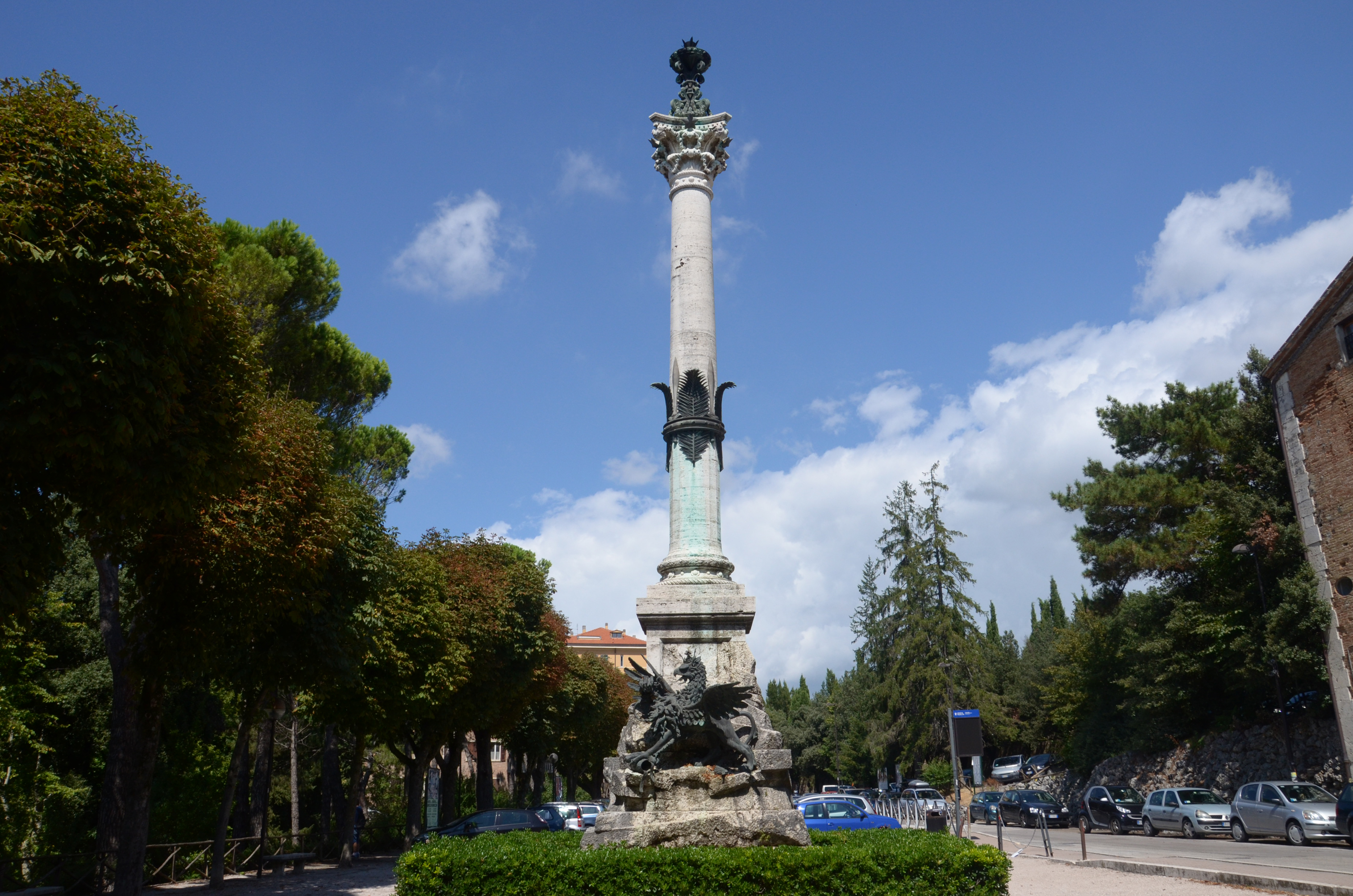 Borgo xx Giugno